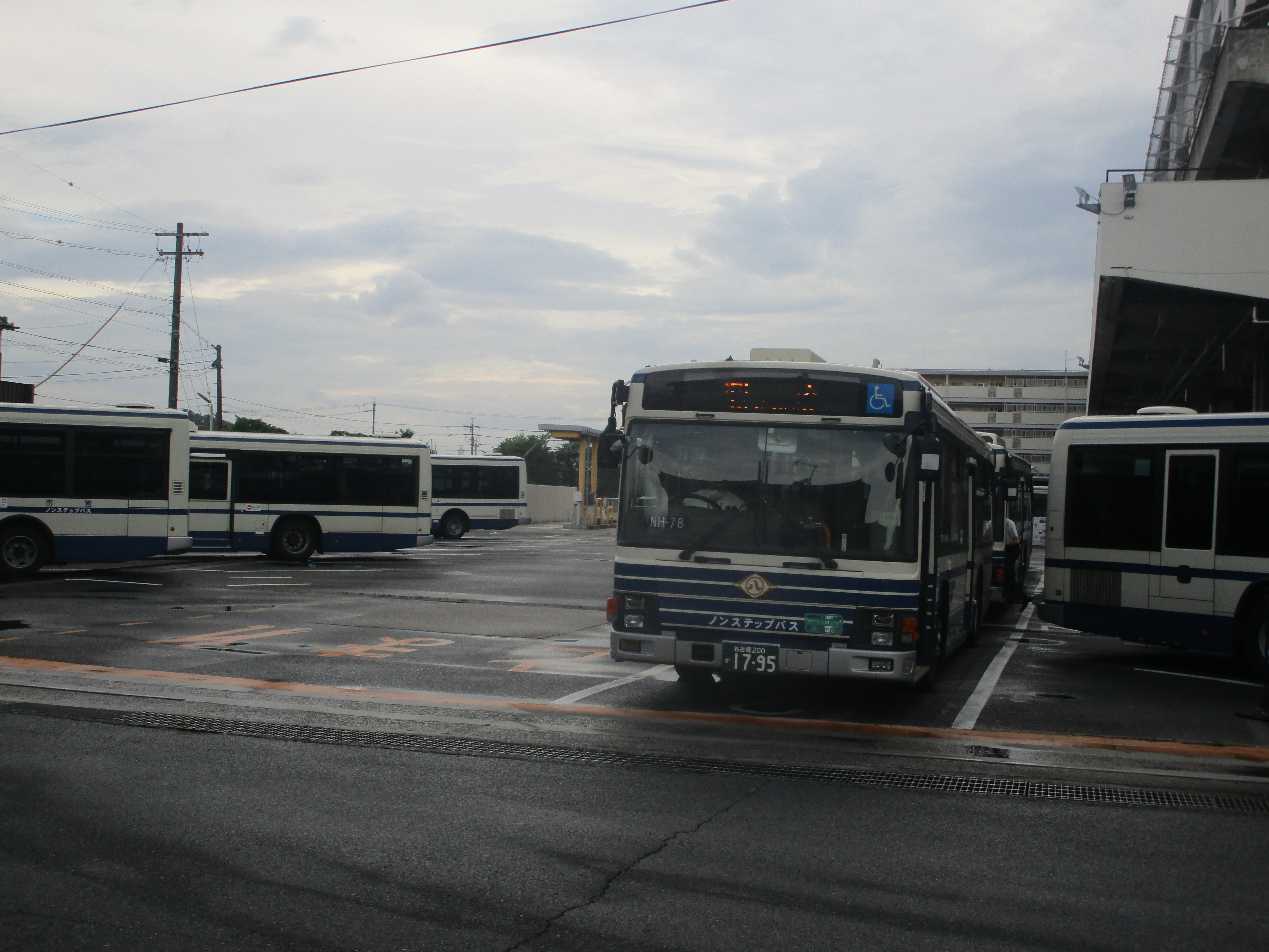 名古屋市交通局野並営業所